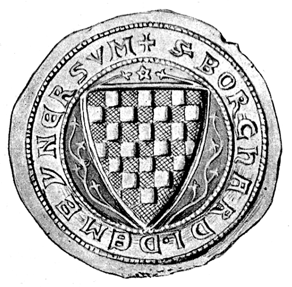 Siegel des Edelherrn Burchard II. von Meinersen (erwähnt 1267–1317/18) an einer Urkunde vom 13. Dezember 1296. Rundes Siegel, 48 mm im Durchmesser. Im Siegelfeld ruht von Blumenranken umgeben der dreieckige Schild, welcher als Wappenzeichen 7 Reihen Schach enthält. In den einzelnen Reihen sind die Einzelstücke abwechselnd tief und erhaben und in den paarigen Reihen abwechselnd erhaben und vertieft dargestellt. Die Umschrift zwischen zwei Perlenreihen lautet: „+ S BORCHARDI DE MEYNERSVM“. – Die reichsfreie Adelsfamilie derer von Meinersen wurde erstmals 1142 mit Luthard I. (bis 1169) erwähnt. Mit dem Tode von Edelherr Bernhard II. (erwähnt 1305–1374) starb das Geschlecht 1374 im Mannesstamm aus.